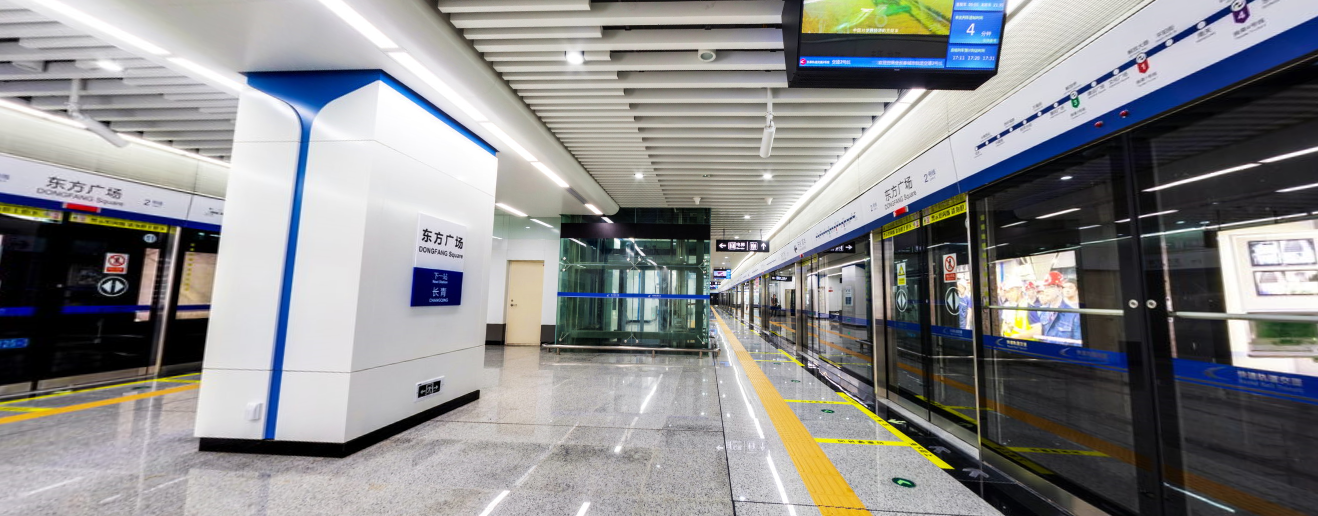 长春地铁2号线东方广场站站台